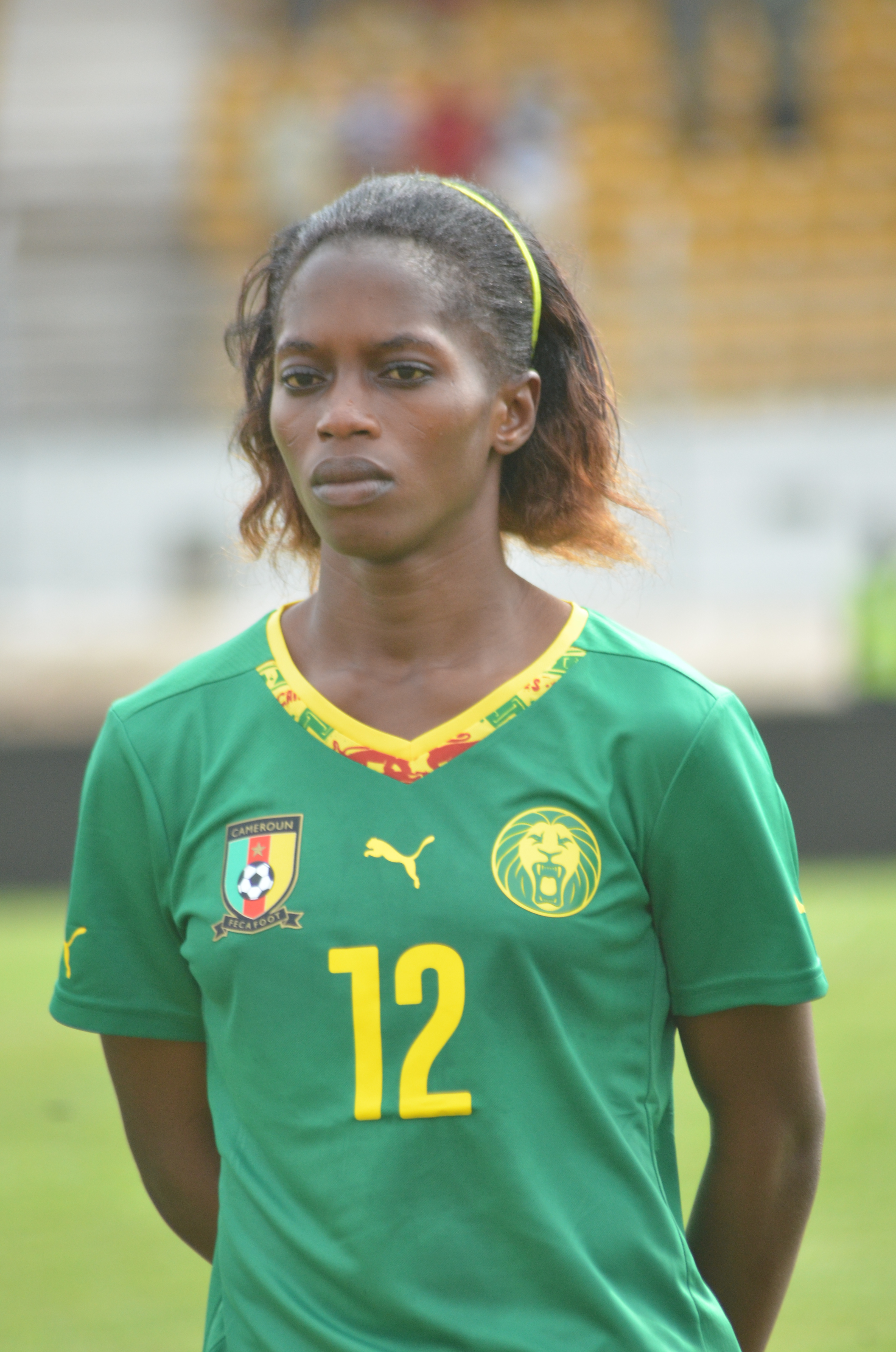 Défenseure de l'équipe nationale du Cameroun